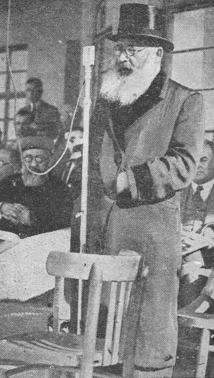 הרב he:משה אביגדור עמיאל.